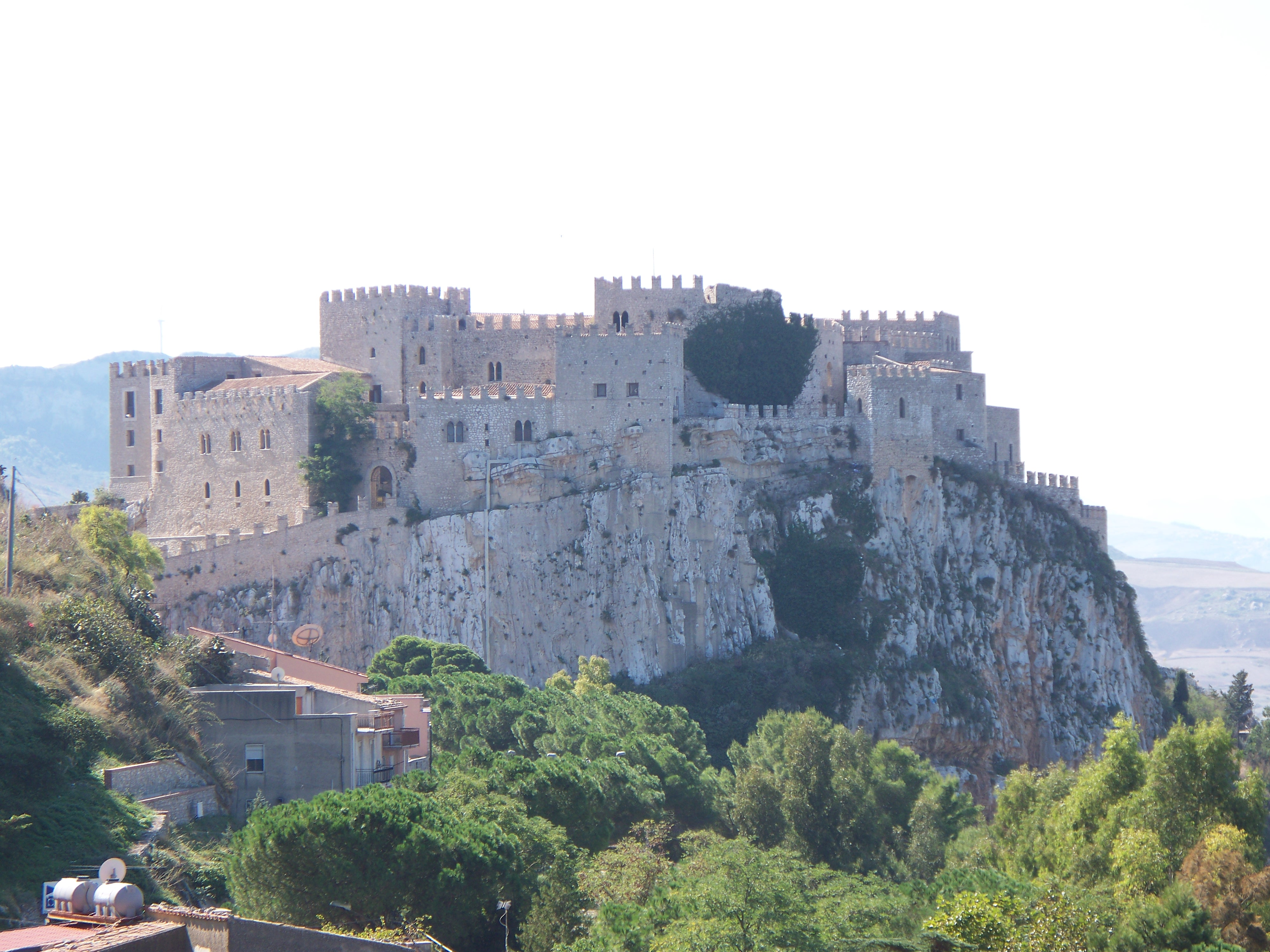 Castello di Caccamo